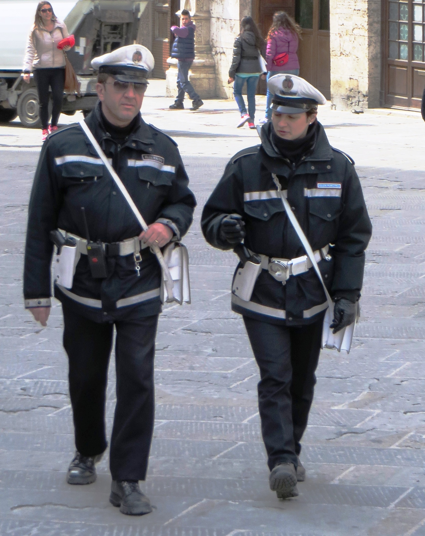 plaatselijke politie Perugia